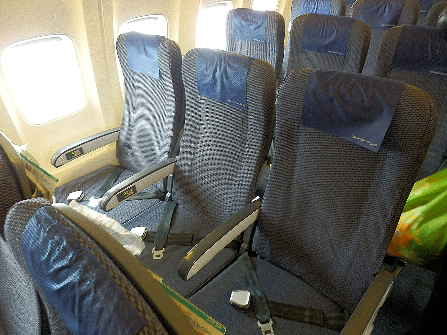 全日本空輸 B737-800 国内線普通席シート